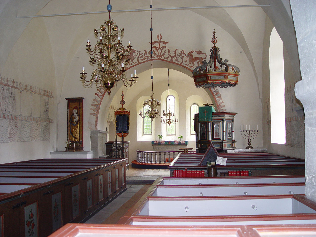 Eke-Kirche auf Gotland. Chor und Langhaus Mitte 13.Jh., Turm um 1300